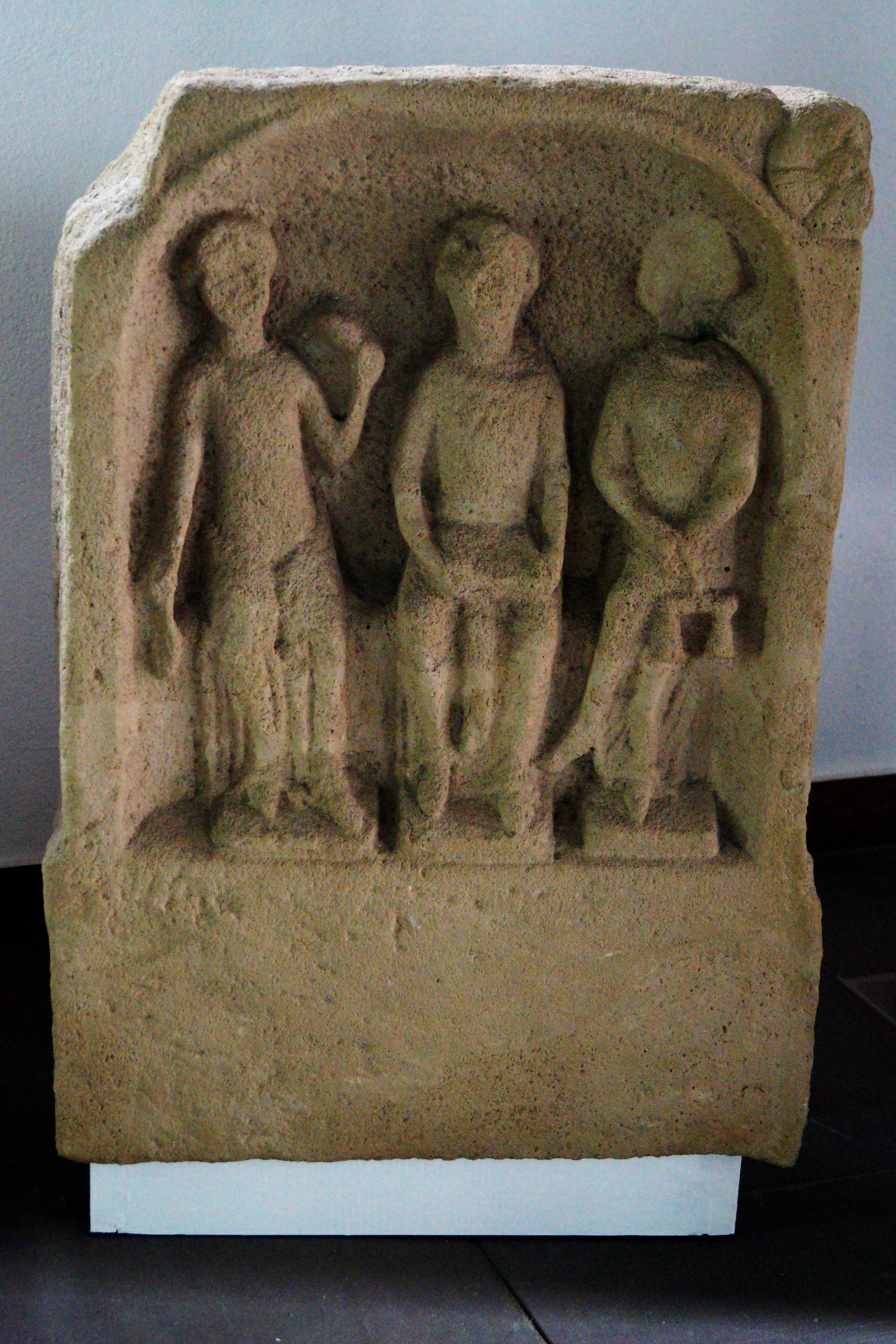 Römisches Matronenrelief aus Altenstadt, Wetteraukreis in Hessen. Ausstellung im Heuson-Museum Büdingen.